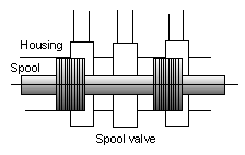 Hydraulic spool valve